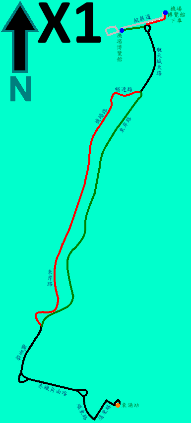 中文（香港）: 機場節日特別巴士路線X1的走線圖